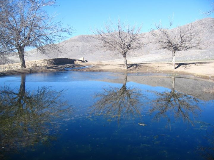 باغ های سلیمانی